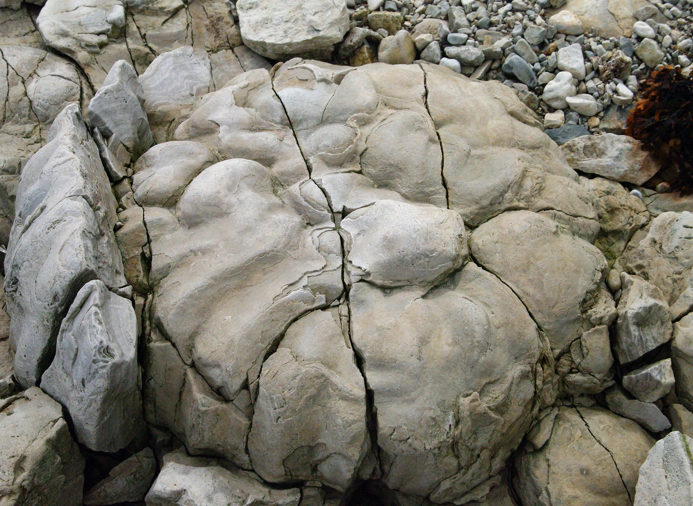 Stromatoliit Kübassaare rannal, Saaremaa